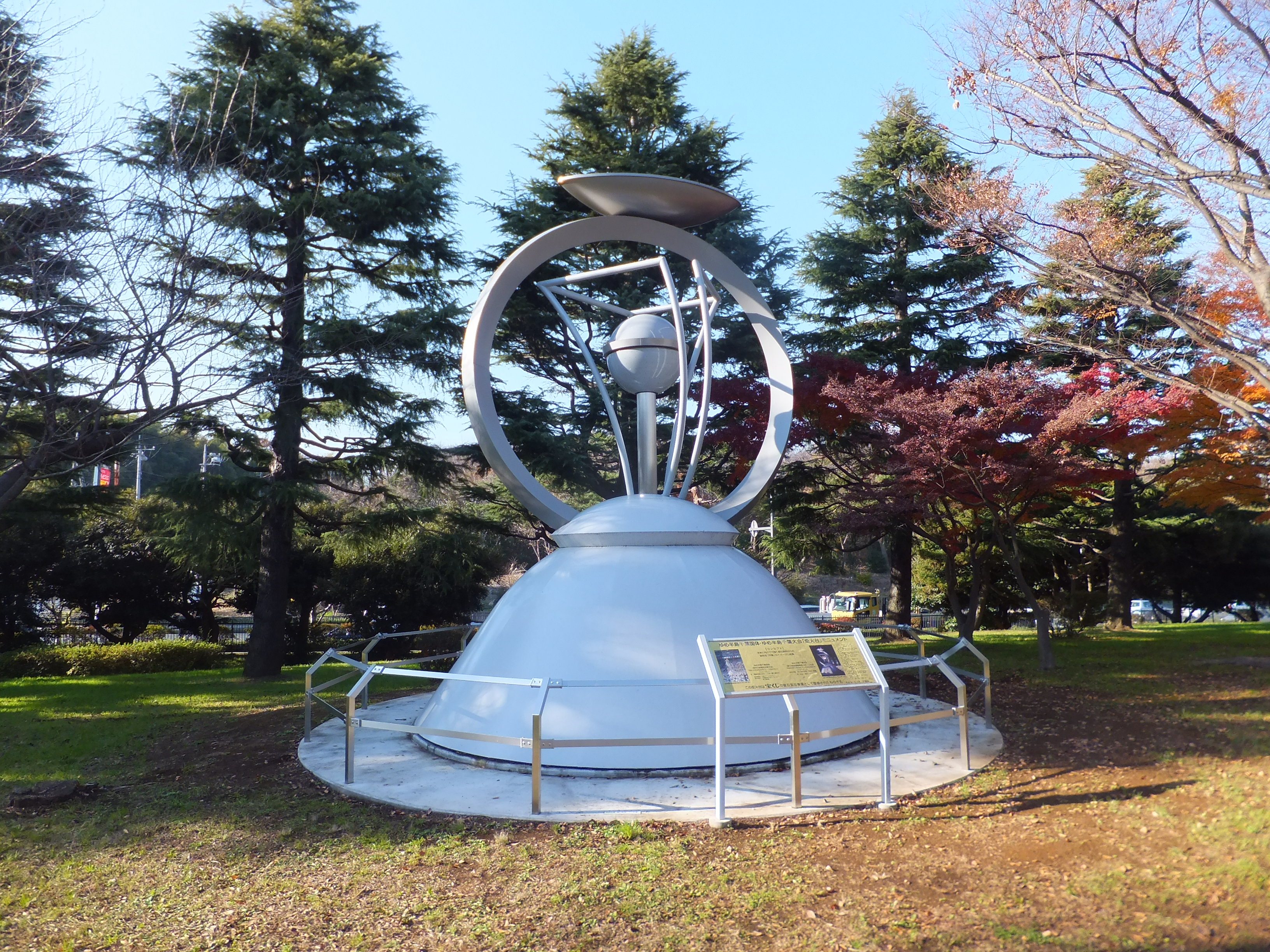 千葉県総合スポーツセンターにあるゆめ半島千葉国体(2010年)で使用された炬火台のモニュメント。